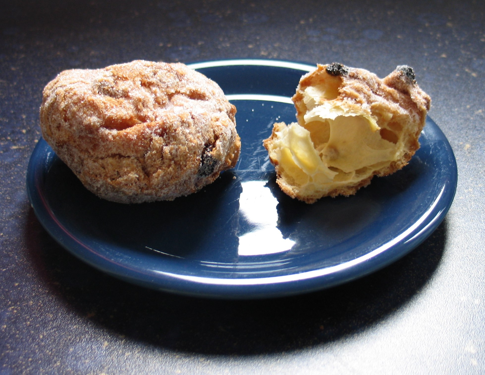 Zwei Rheinische Krapfen aus Brandteig mit Rosinen, gekauft am 27.01.2007 in Bonn